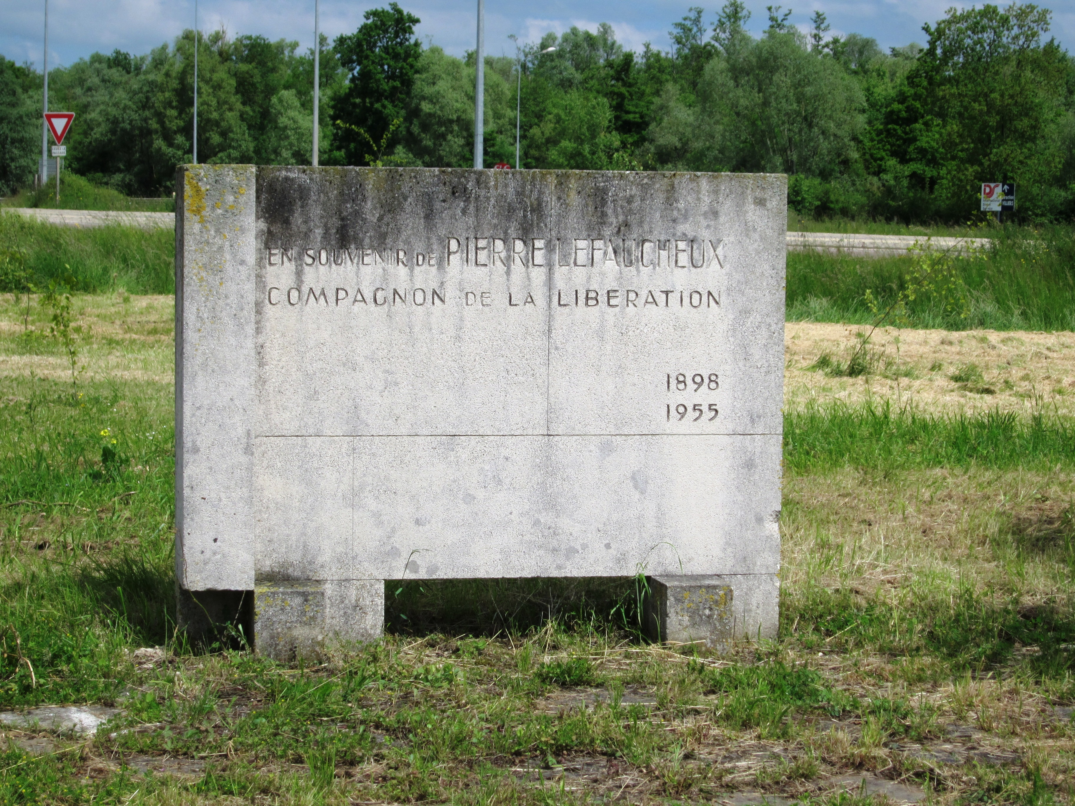 In 1955, thanks to a combination of black ice, tiredness and, one suspects, a poorly positioned "Deviation" sign, Pierre Lefaucheux was in an accident in his Renault Fregate which turned over. The killer was his briefcase, unsecured on the back seat, which jumped up and thumped him on the back of the head as or directly after the car rolled over. The road junction has moved maybe 30 meters to the west, but the memorial remains. Someone has even cut the surrounding grass (June 1013)